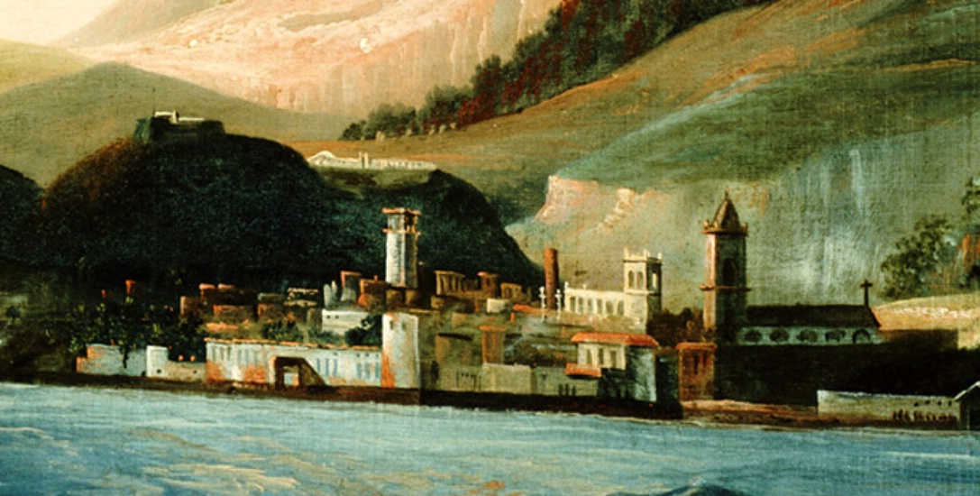 Detail